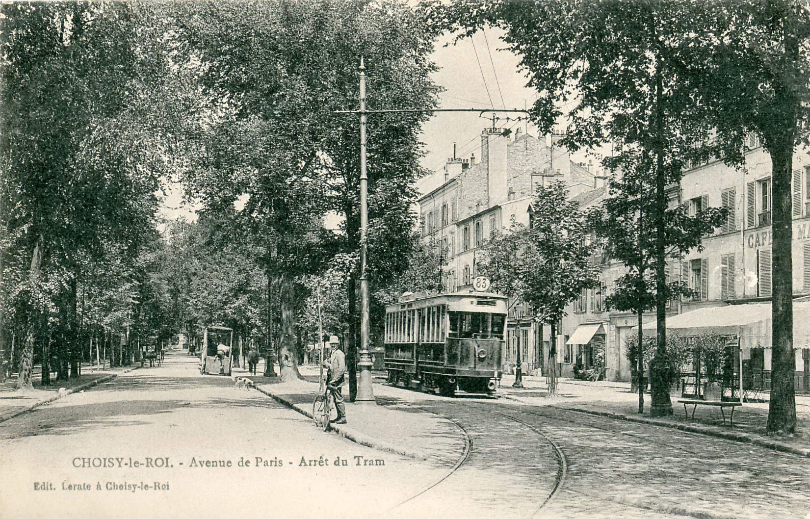 Carte postale ancienne éditée par Lerate à Choisy-le-RoiChoisy-le-Roi - Avenue de Paris - Arrêt du TramwayVue en moyen plan d'une motrice de la ligne 83 de la STCRP